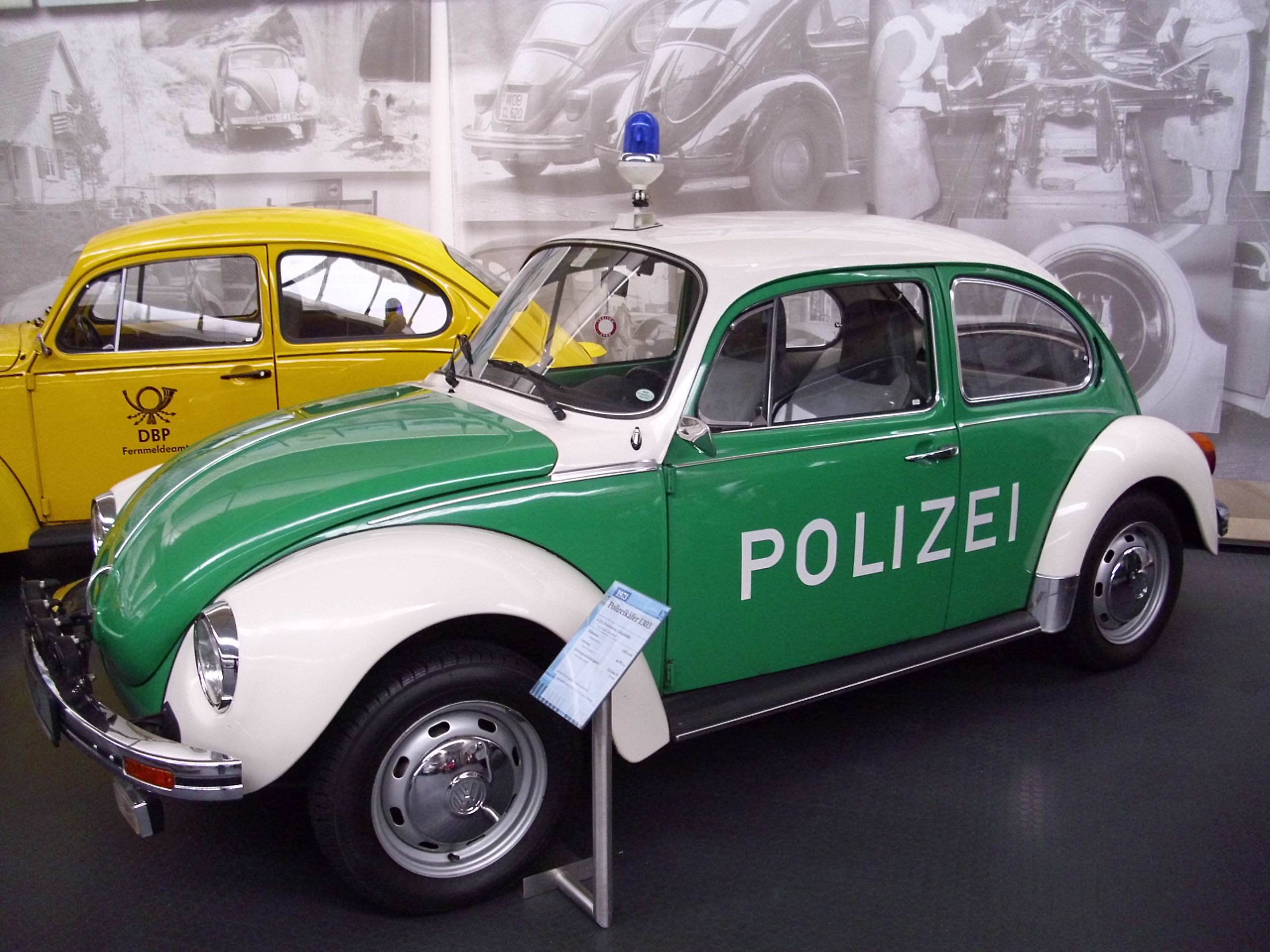 VW Käfer 1303 in Polizeiausführung. Wurde so durch die Polizei Niedersachsen genutzt, steht jetzt im Museum der Stiftung Automuseum Volkswagen